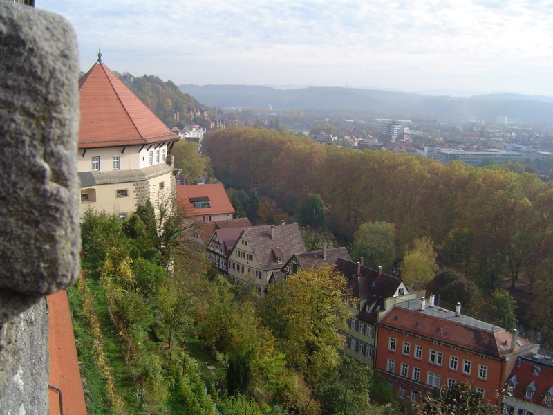 Hohentübingen. Fünfeckturm und Burgweingarten